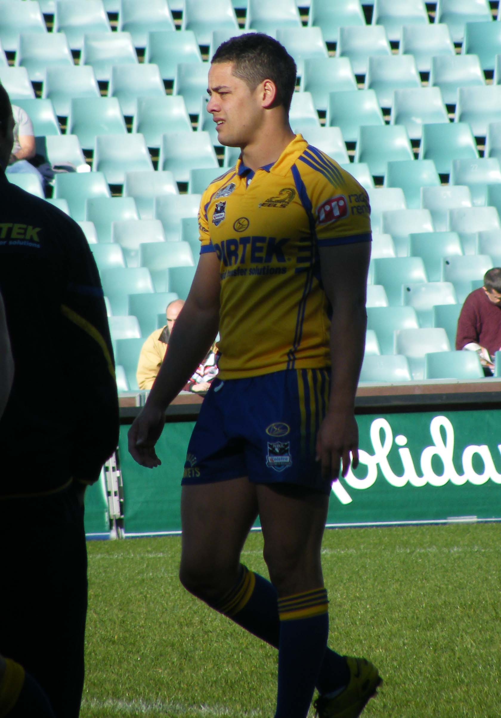 Parramatta backline star Jarryd Hayne.